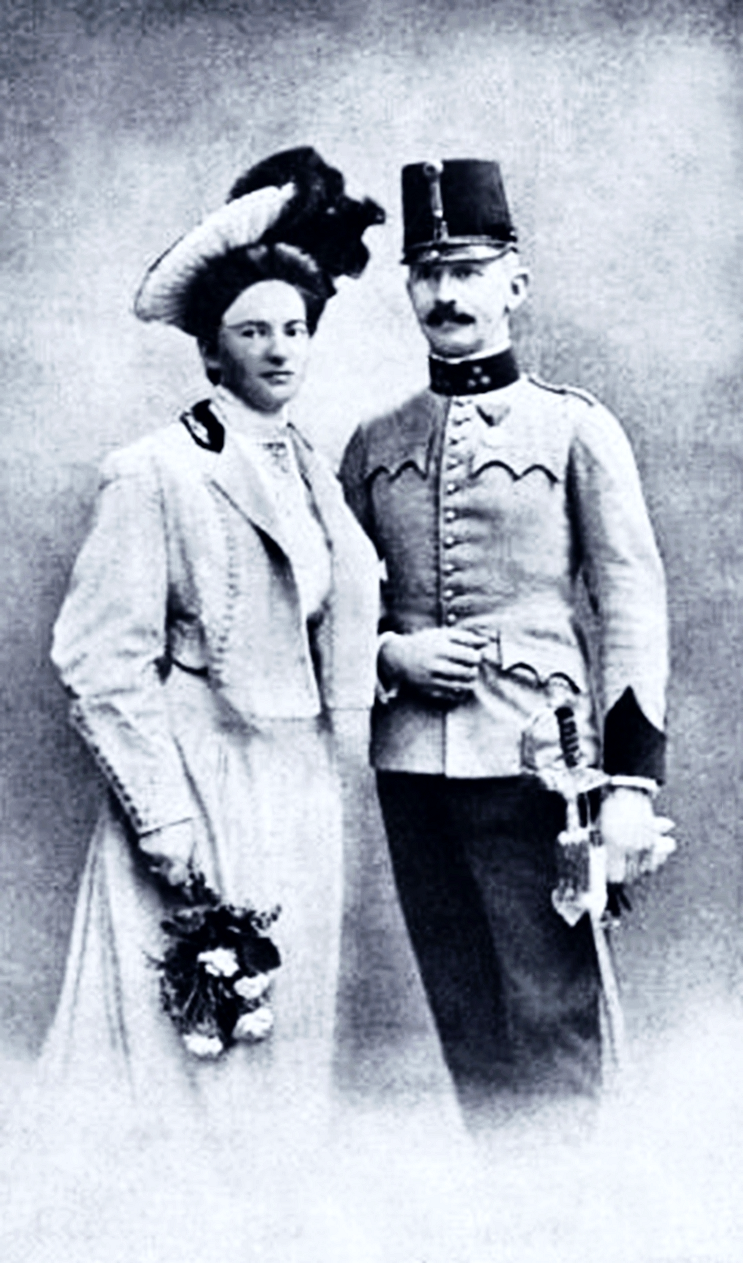 Max Freiherr Frölich von Frölichsthal und Emma Freiin von Rolsberg zur Vermählung im Januar 1906